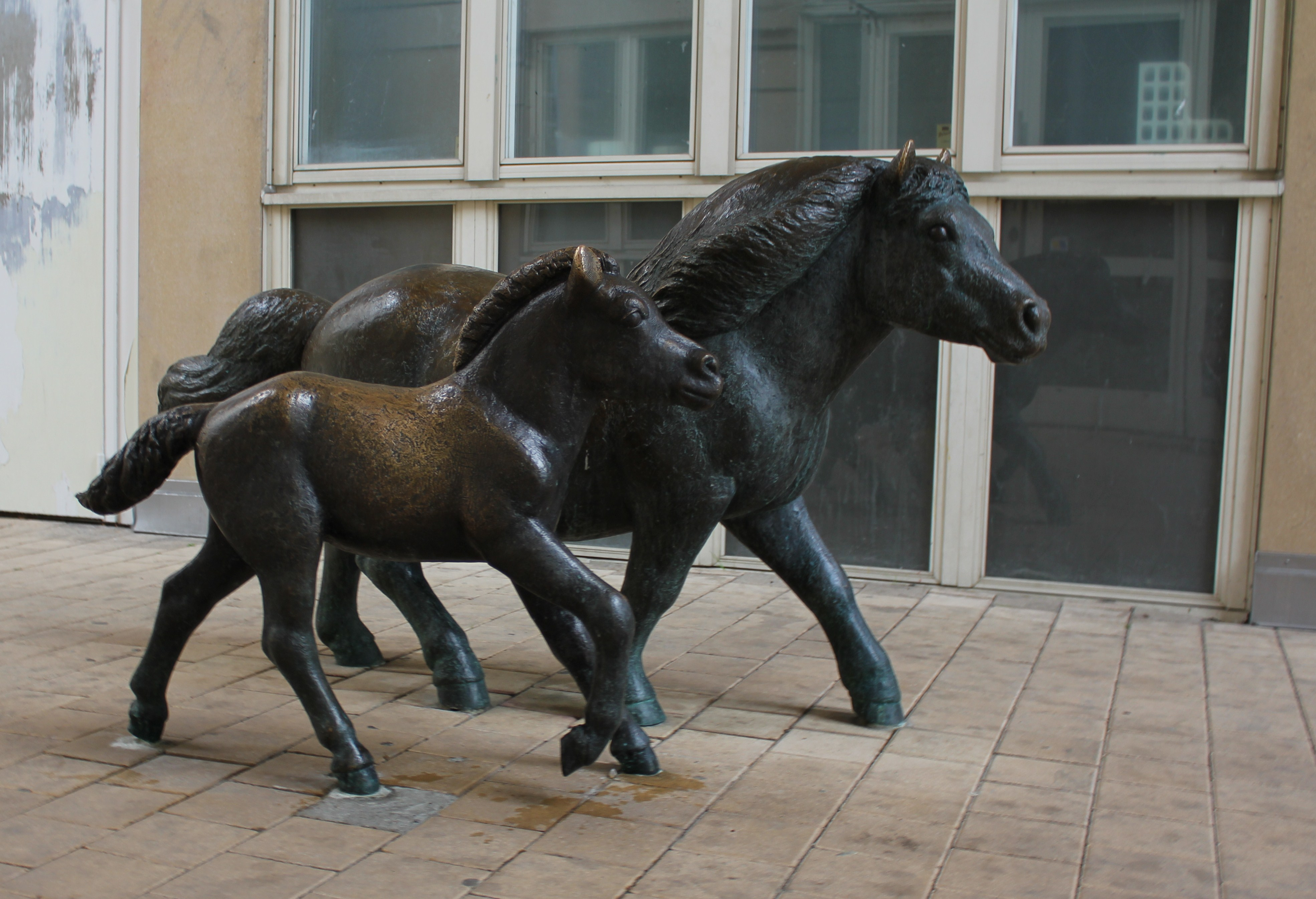 Daphne och Olle av Aline Magnusson, 1992. Skulptur i Bofills båge, Södermalm, Stockholm.